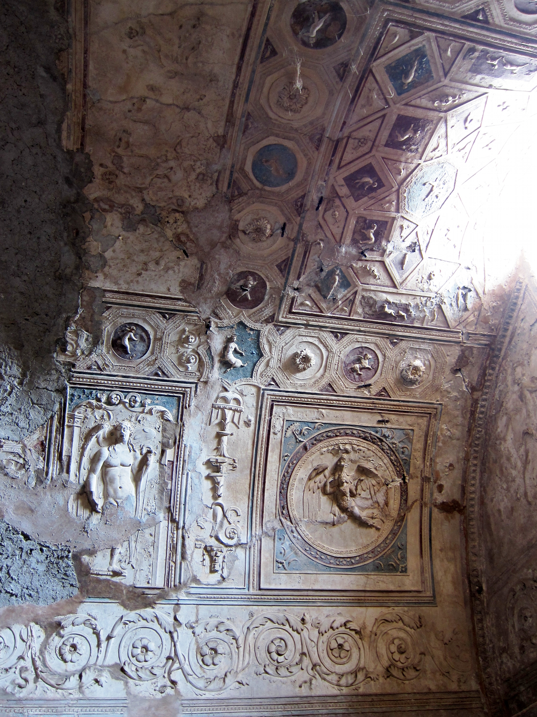 Bas reliefs du tepidarium des thermes de Pompei (Italie).